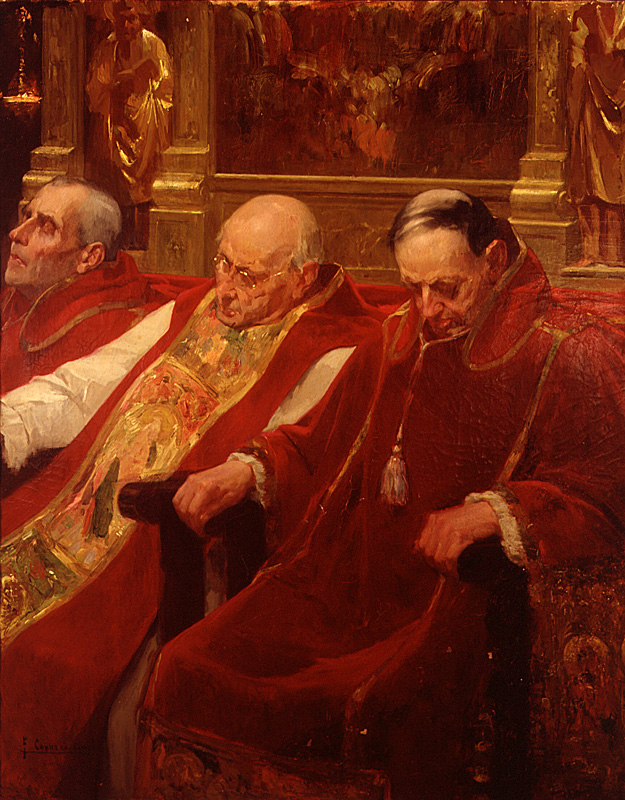 La obra representa a un grupo de eclesiásticos adormilados durante un sermón u homilia.